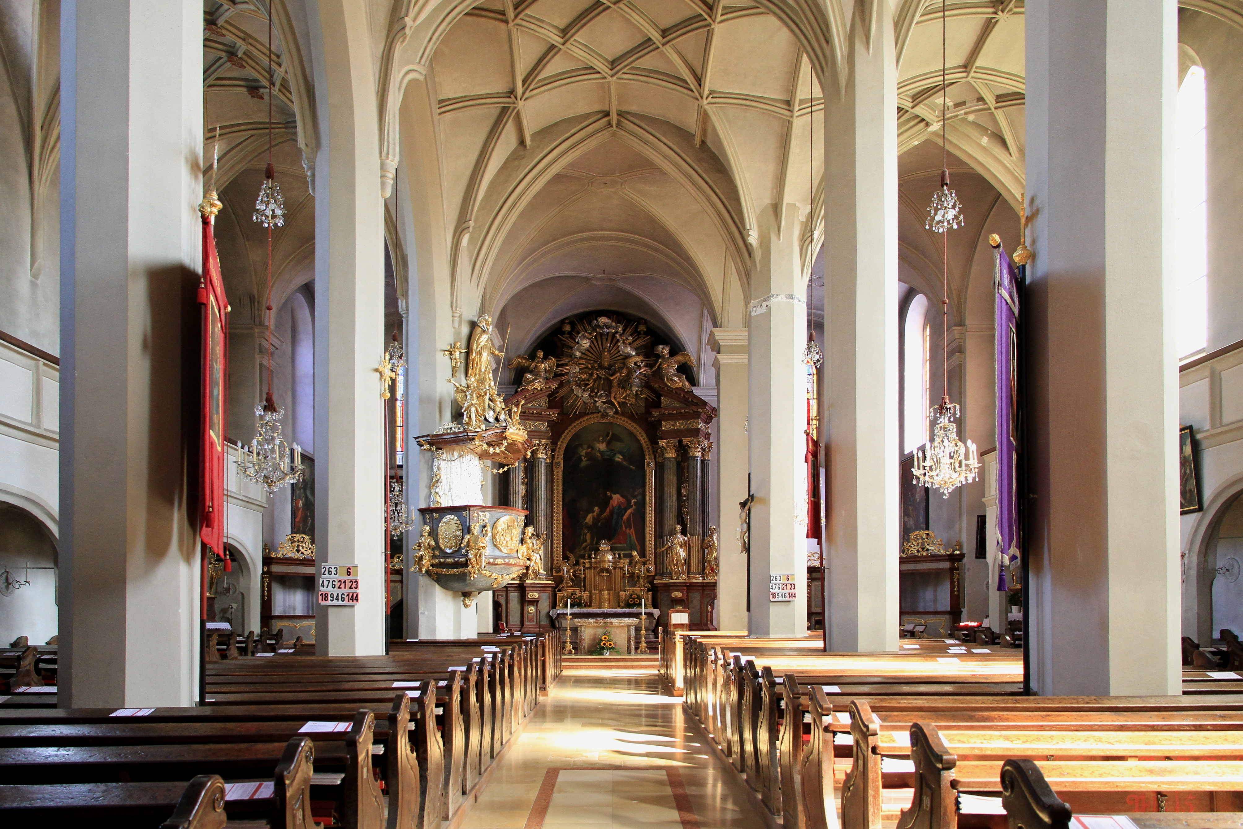 Innenansicht Richtung Hochaltar der katholischen Pfarrkirche hl. Petrus in der niederösterreichischen Marktgemeinde Purgstall.